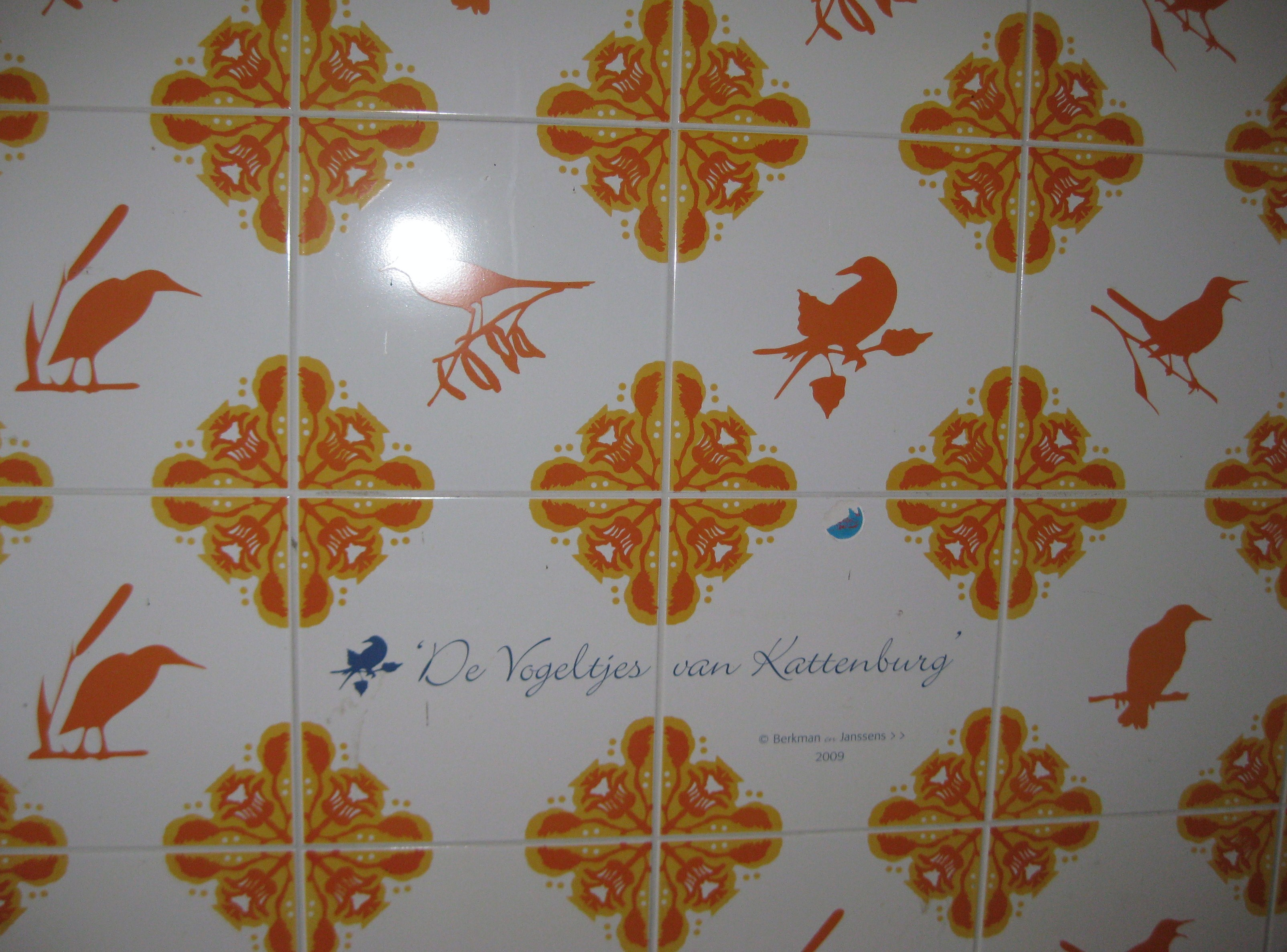 "De Vogeltjes van Kattenburg". Kunstwerk in twee delen van het kunstenaarsduo Berkman en Janssens in de onderdoorgang Kattenburgerdwarsstraat, Amsterdam. Staal, verlichting en tegels. 2009